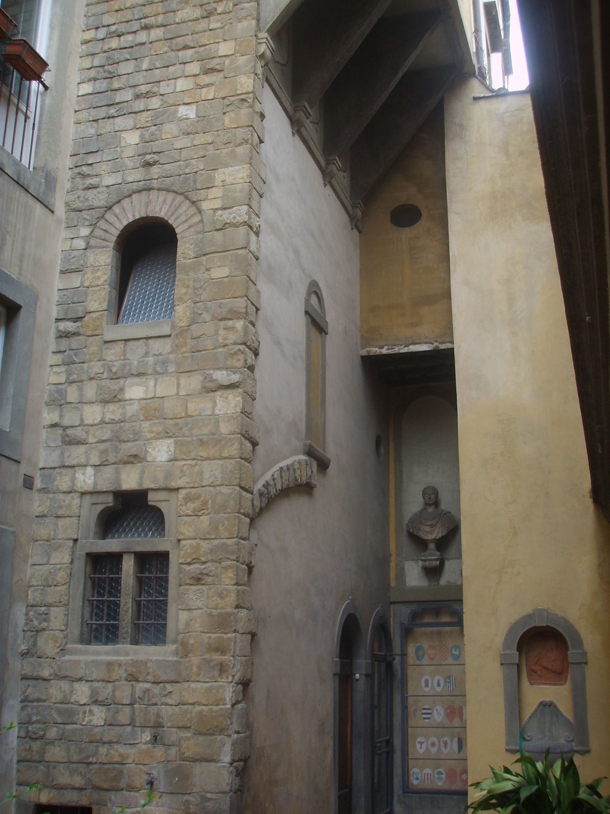 Palazzo Pucci in Florence, Italy